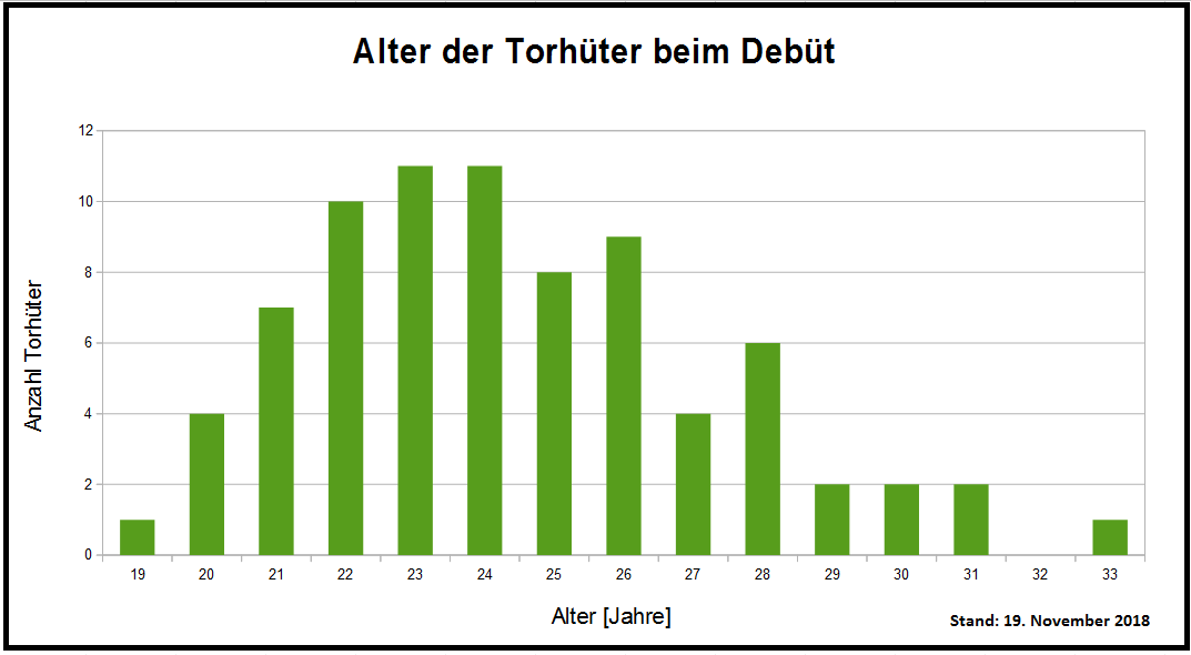 Altersverteilung der deutschen Fußball-Torhüter beim Debüt in der Nationalmannschaft, Stand 2.6.2009